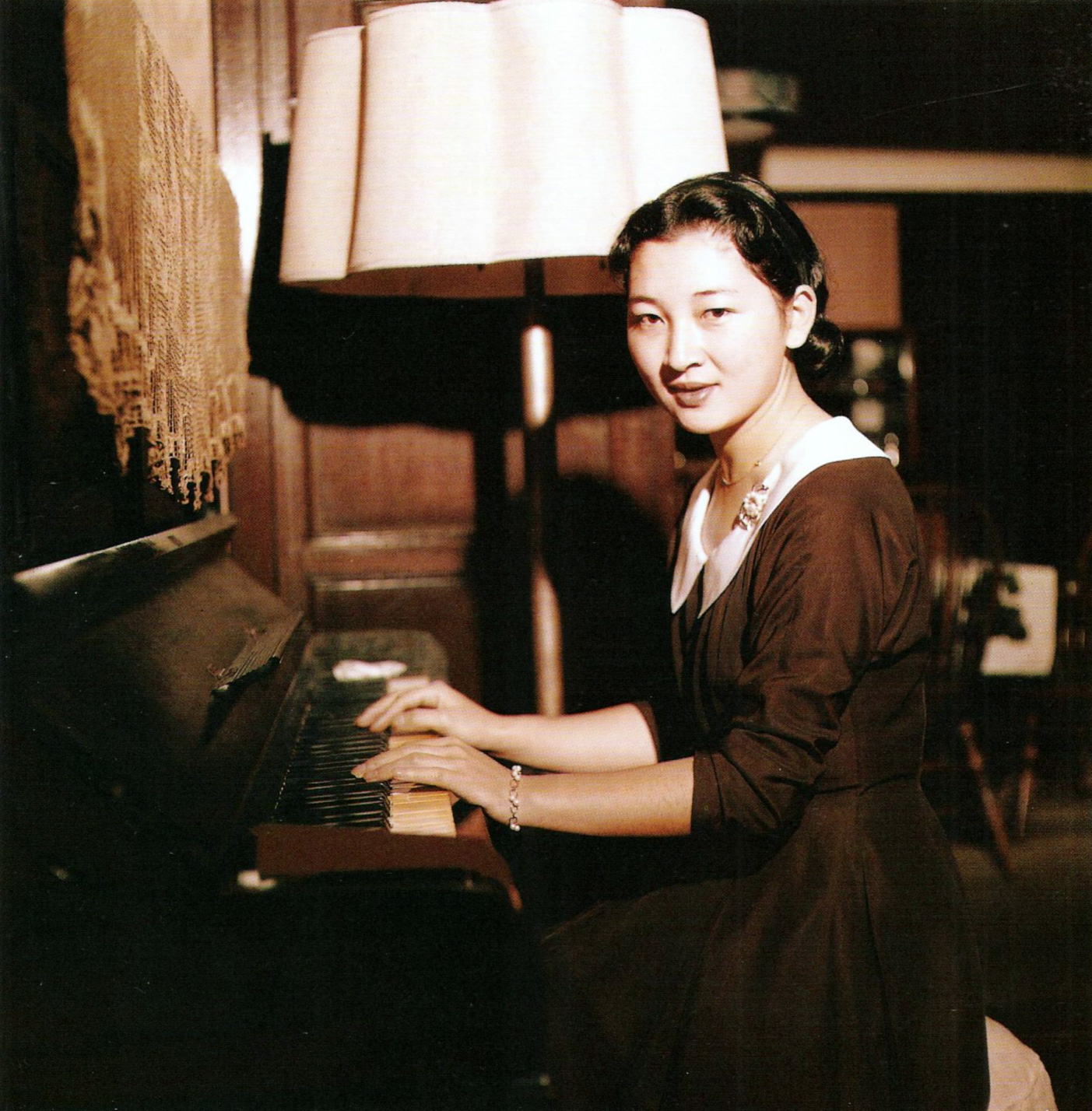 婚約発表直前の正田美智子(Michiko Shōda)